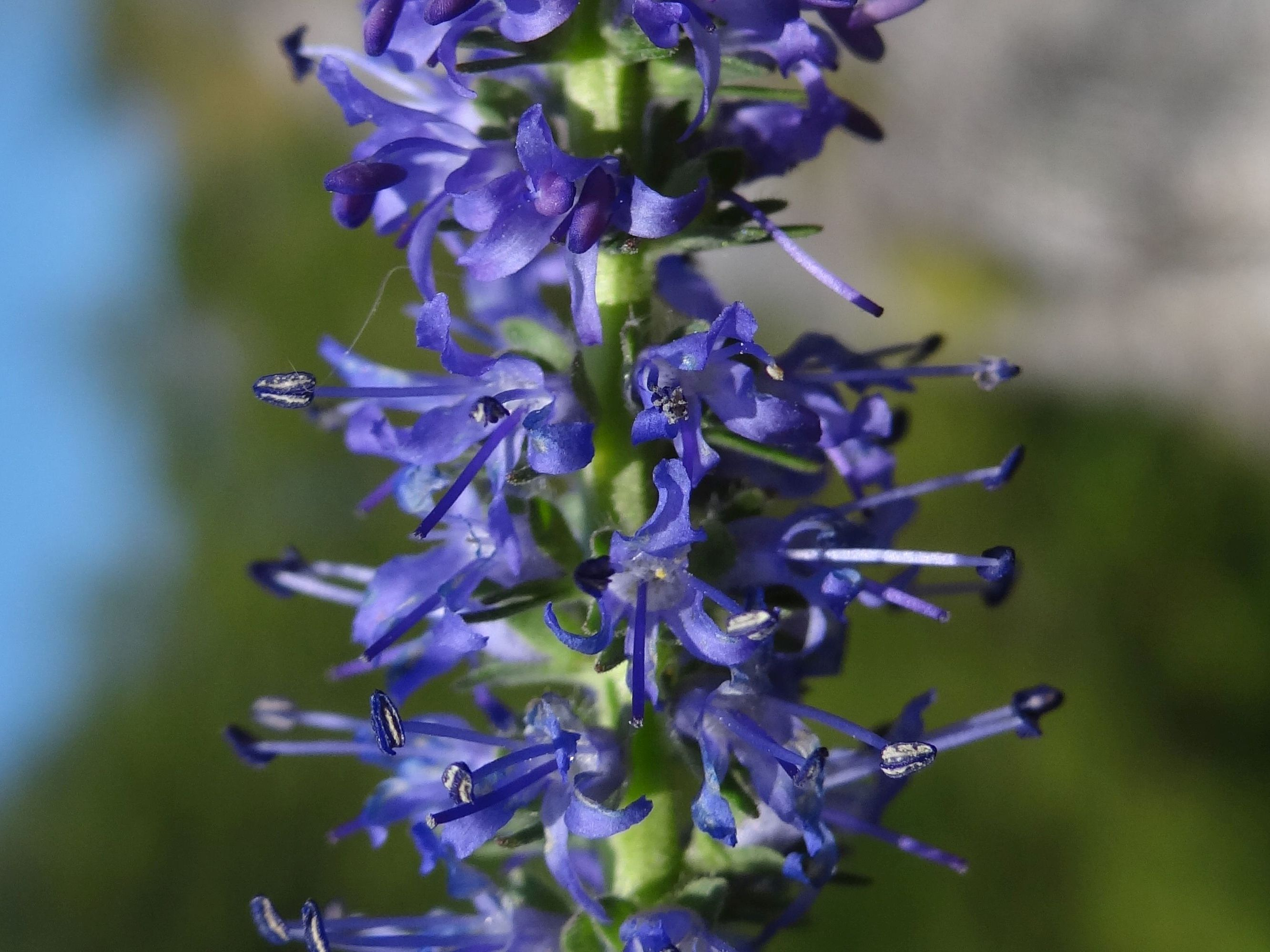 Veronica spicata. Location: Poland, Ryczów, województwo śląskie